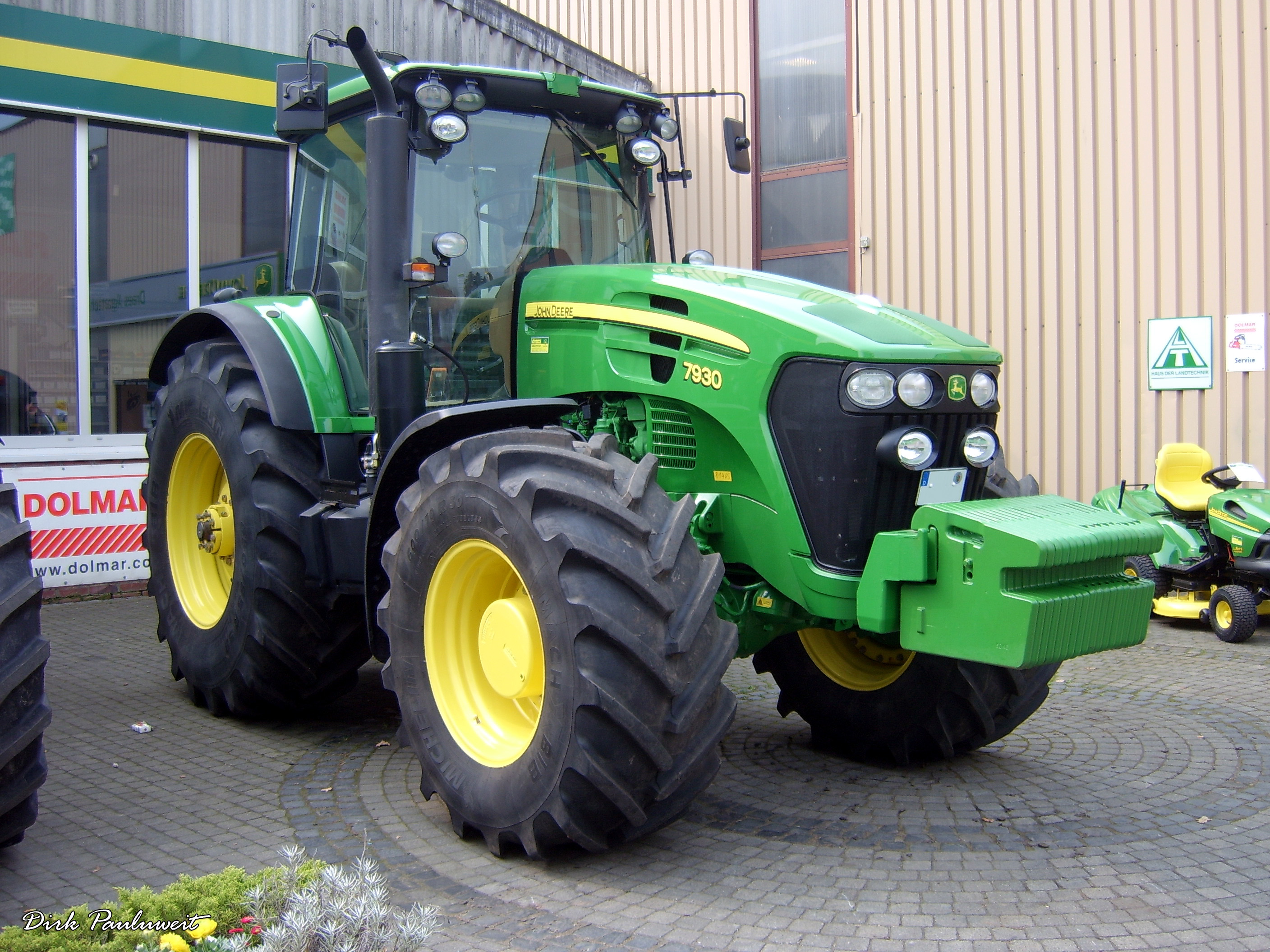 John Deere 7930